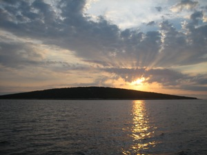 Kozjak, an island in Croatian part of the Adriatic sea / Kozjak, otok između Lošinja i Svetog Petra.